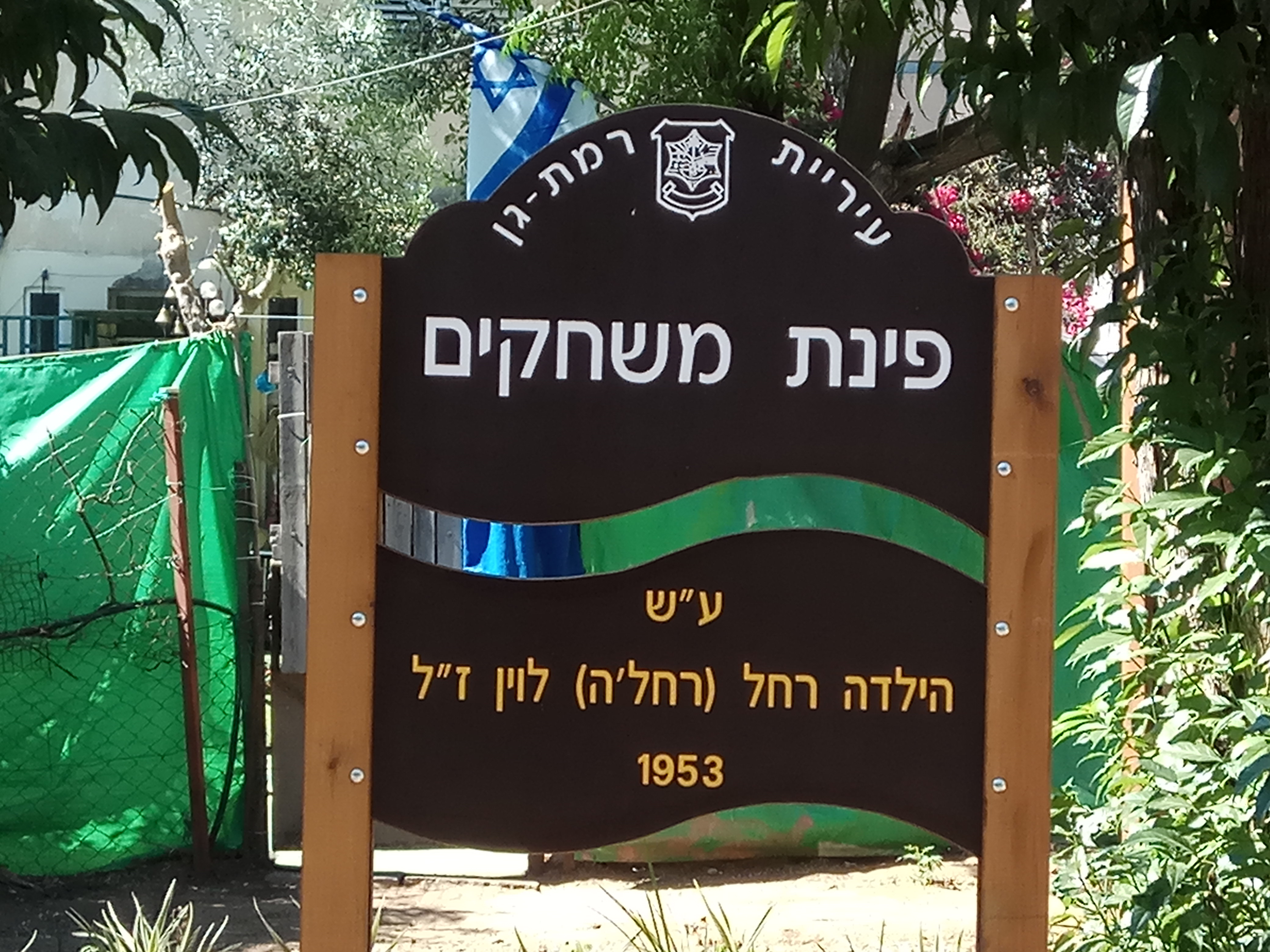 פינת משחקים בגן נווה יהושע על שם הילדה רחל לוין, תושבת השכונה שנרצחה ב-1953.